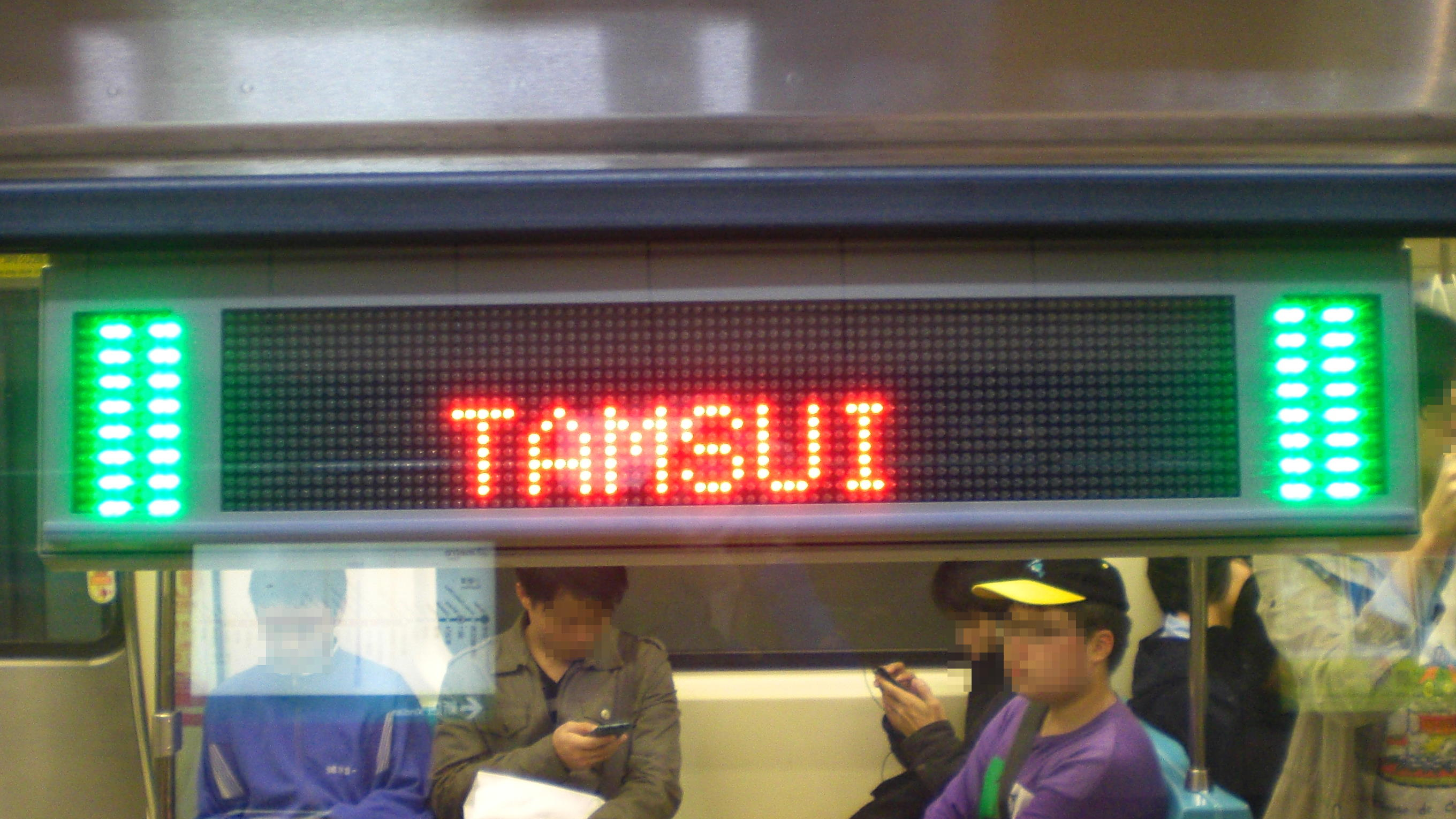 台北捷運381型電聯車車側目的地顯示器HT-MOD1040001-0142正面顯示英文終點站名